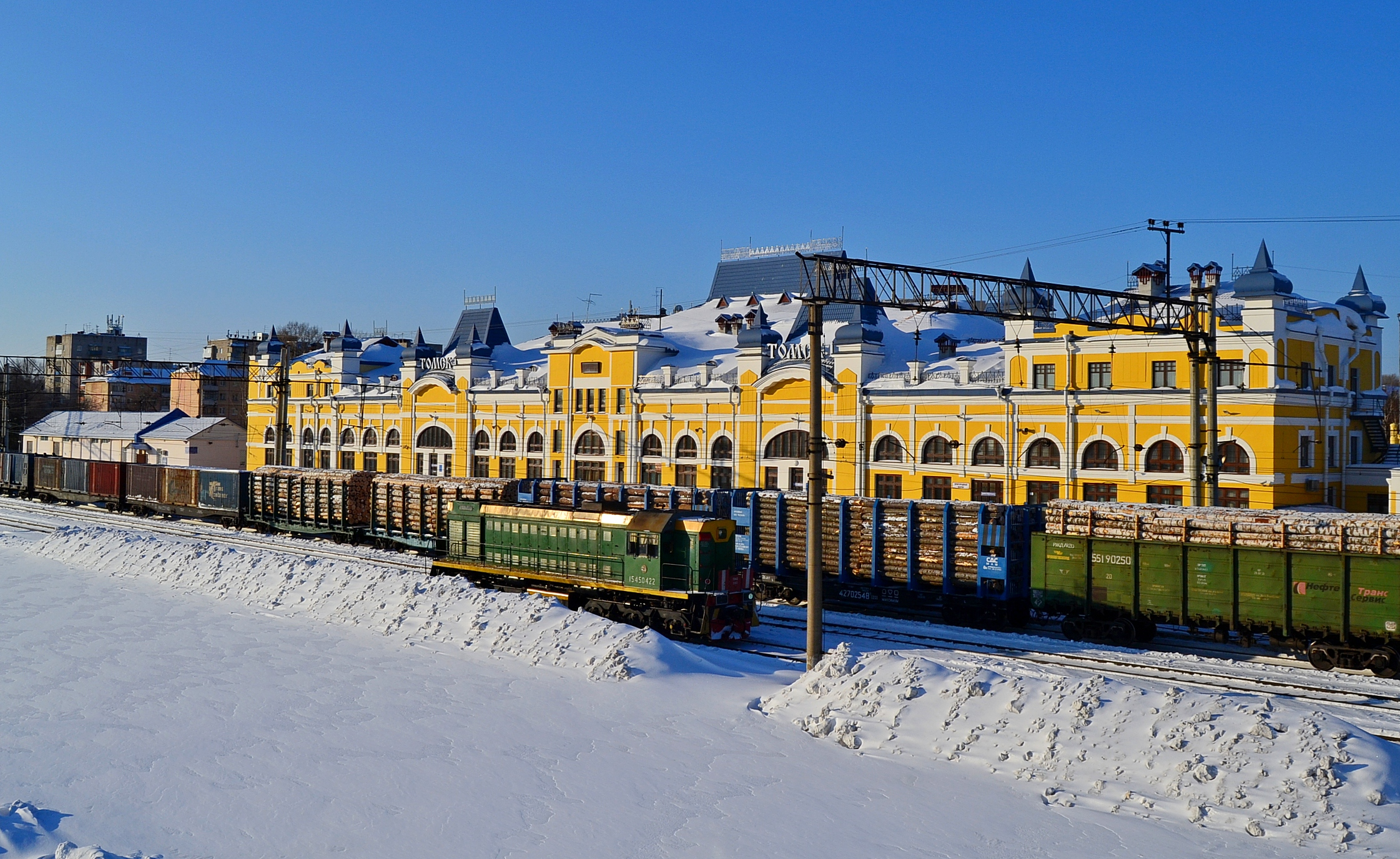 Вокзал Томска, отреставрирован в 2004 к 400-летию города. На переднем плане маневровый тепловоз по станции ТЭМ2УМ-580